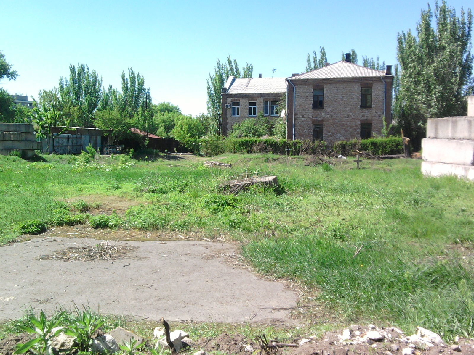 Пустир у Луганську на місці Казанської церкви, зруйнованої в 1937 році